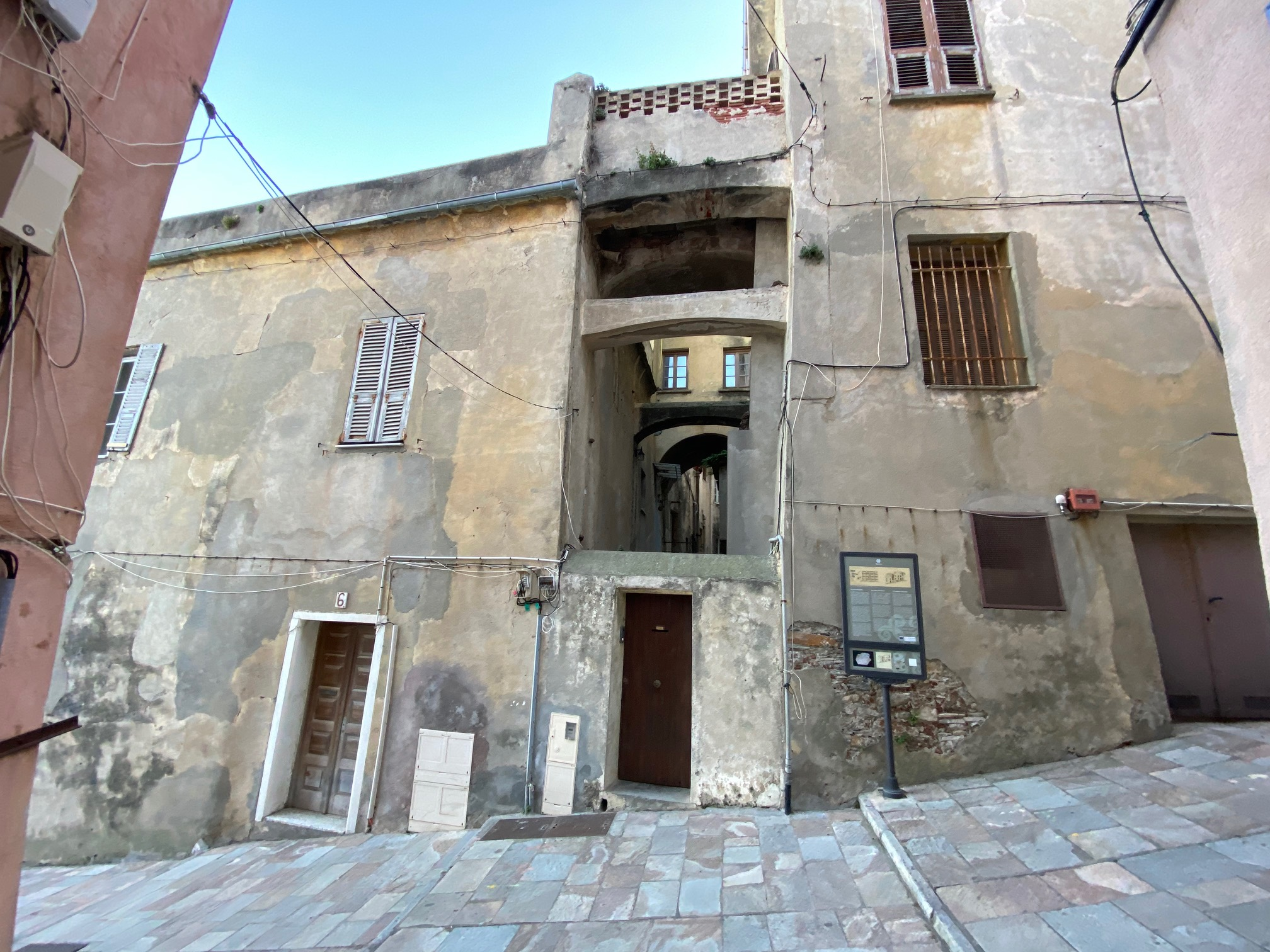 Corsu: U Palazzu Viscuvile, in citatella di Bastia